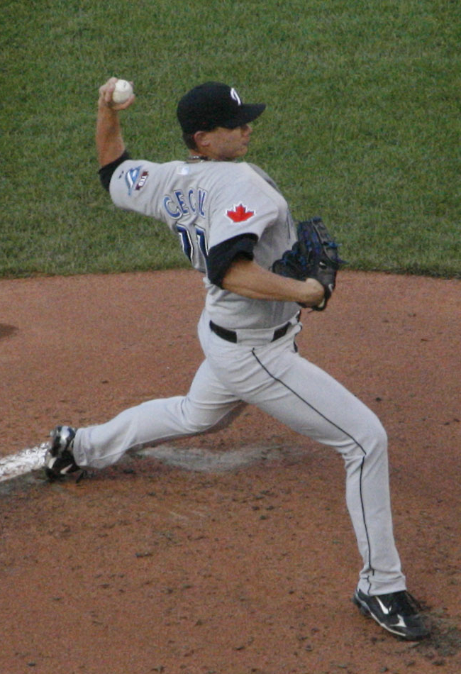 Brett Cecil